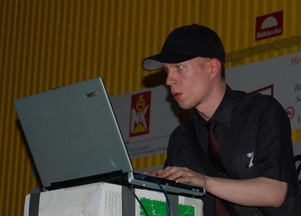 Psilodump live during Birdie 2006.